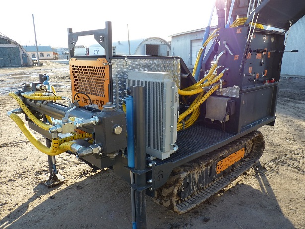 Буровой насос "Вулкан"- производство Россия